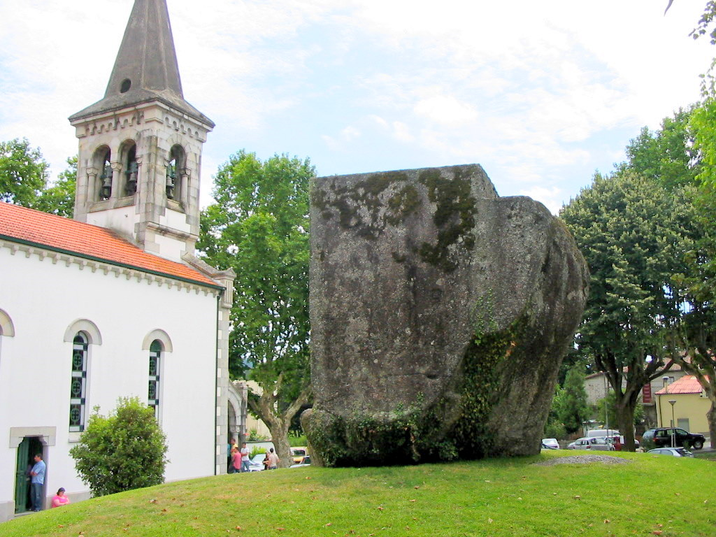 Ara de Trajano (Caldas das Taipas, Guimarães, Portugal)